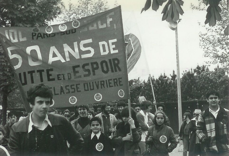 50ème anniversiare de la JOC, 14 mai 1978, La Courneuve.